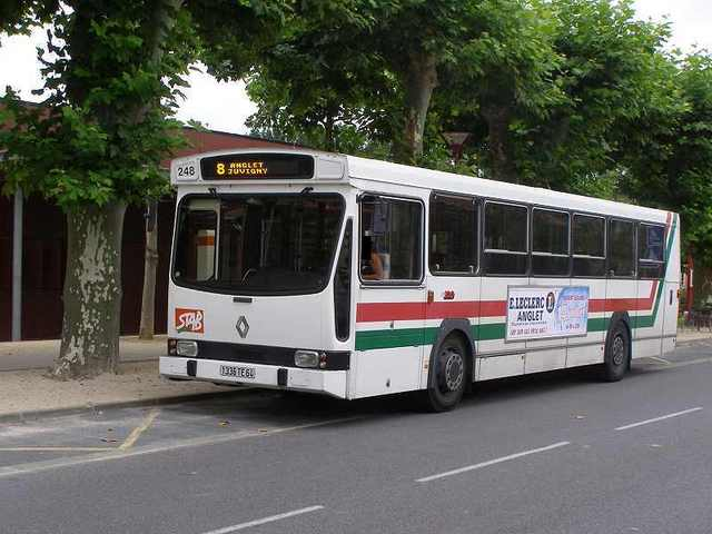 Photo d'un bus Renault PR100 de la ligne 8 sur le réseau de la Stab à Bayonne